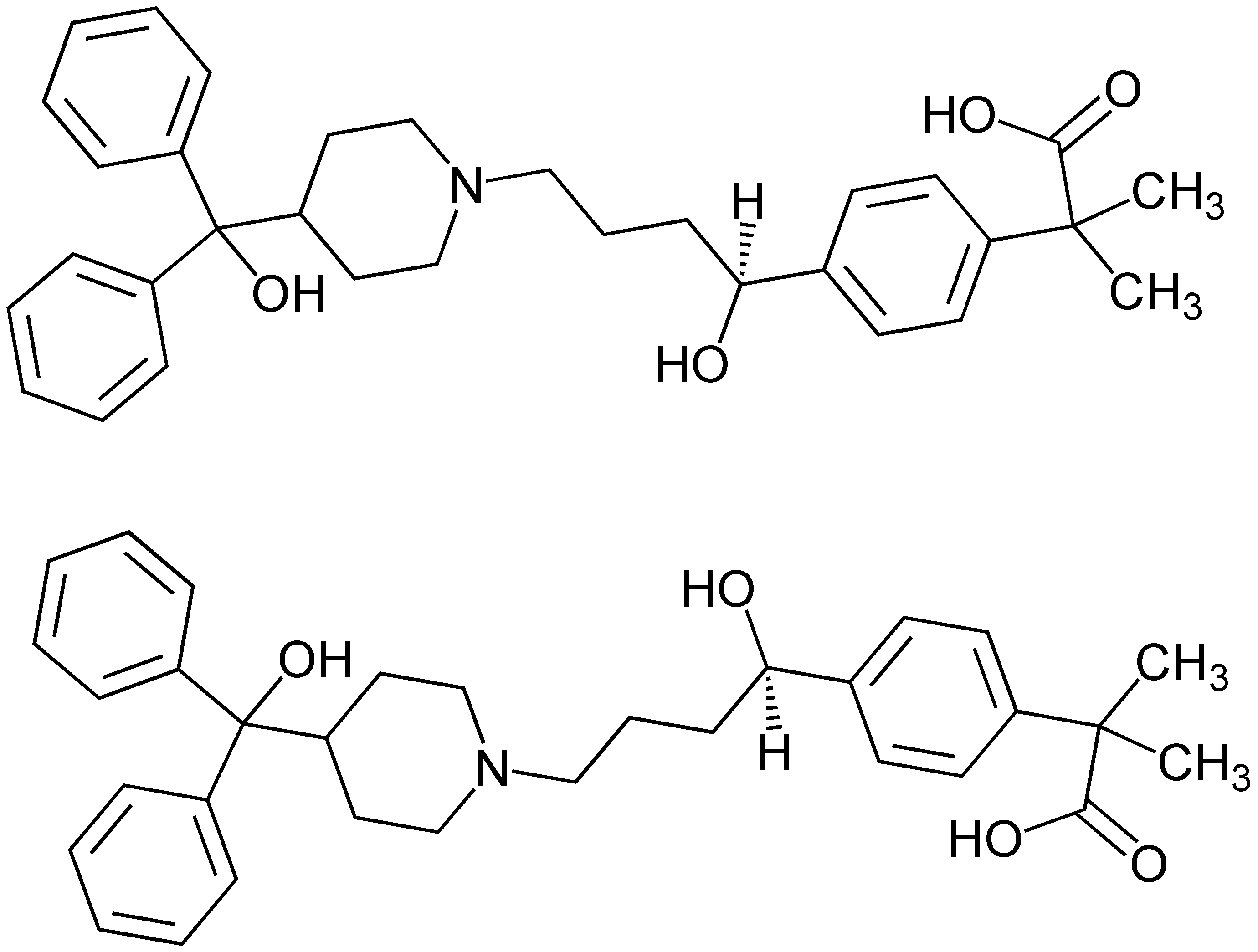 Fexofenadin-Racemat Strukturformeln der Enantiomere